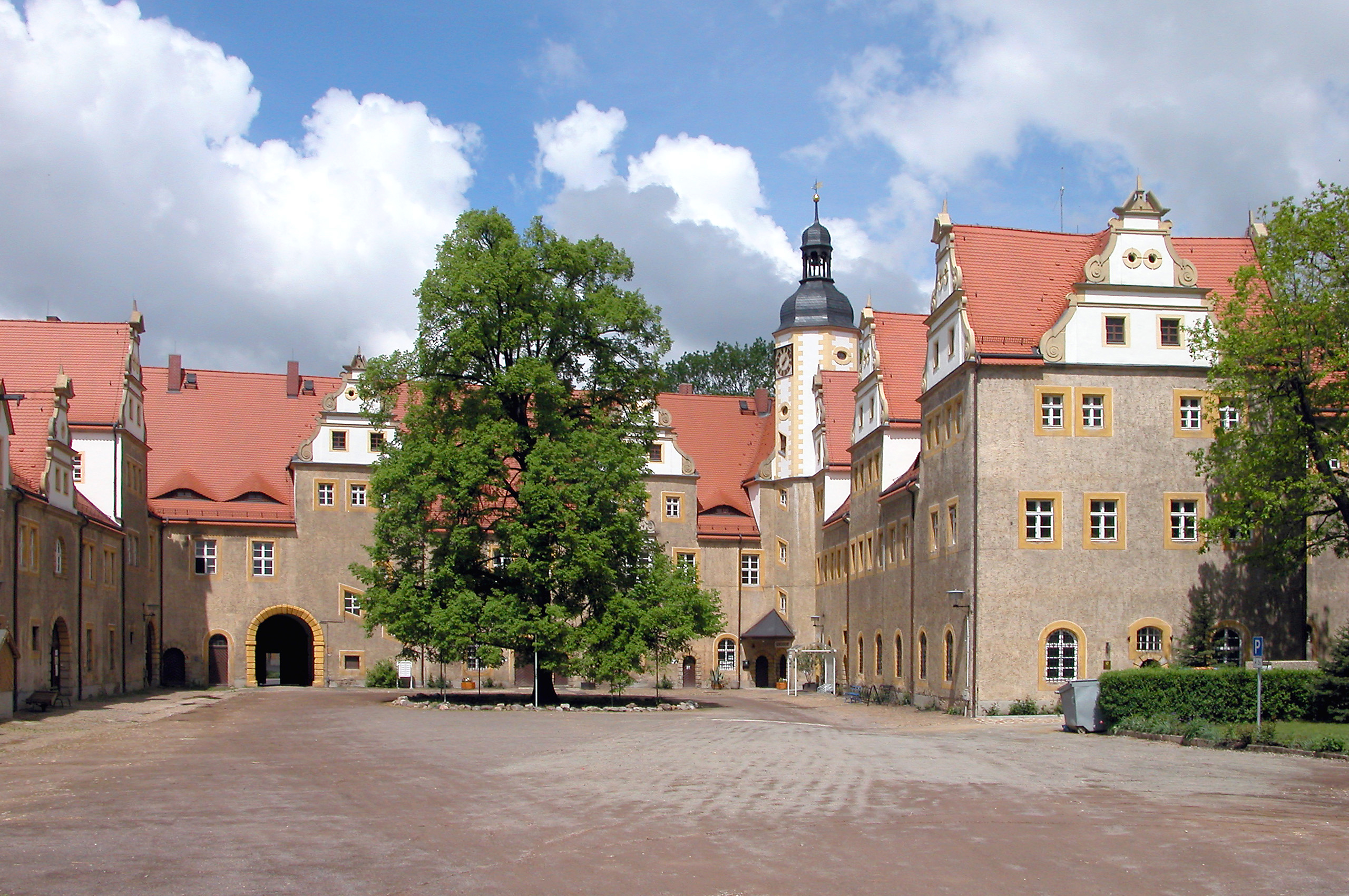 16.05.2004 04779 Wermsdorf, Altes Jagdschloß 1: Altes Jagdschloß (GMP: 51.282710,12.939678). Ursprünglich ein Wasserschloß. Renaissancebau, errichtet unter Kurfürst Christian II. von 1608 bis 1610 auf dem Gelände des alten Rittergutes. Zwischen 1617 und 1627 erfolgte ein großzügiger Ausbau des Schlosses unter der Leitung von Simon Hoffmann und Johann Friedrich Steyer. An den Nordflügel wurden Ost- und Westflügel angefügt. Dadurch entstand eine herrschaftliche Dreiflügelanlage. Der Westflügel wurde 1902 aufgestockt und den beiden anderen Schloßflügeln angeglichen. Heute befinden sich hier die Gemeindeverwaltung und einen Reitstall. Ansicht Hofseite. [DSCN3499.JPG]20040516640DR.JPG(c)Blobelt